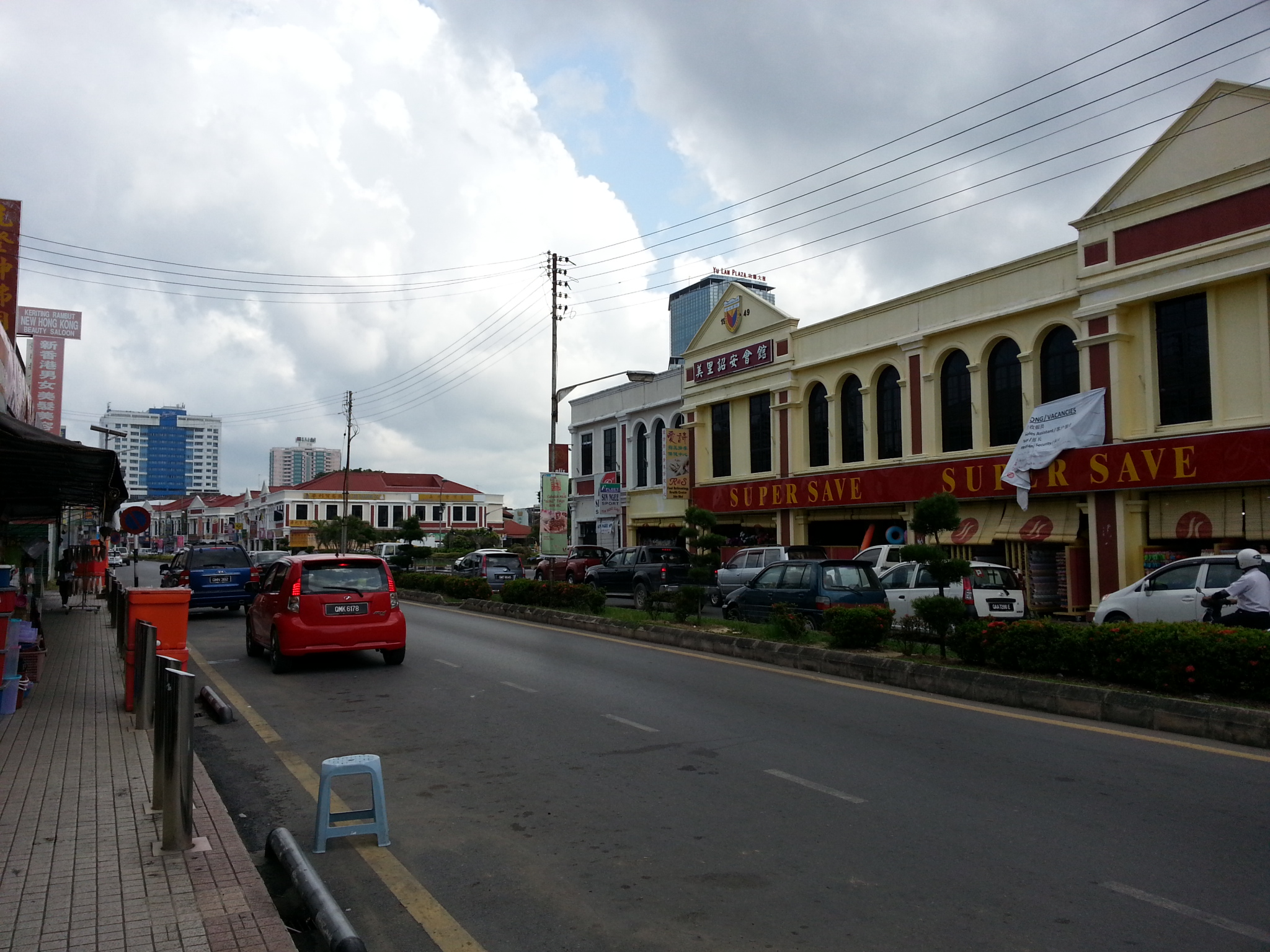 Bandar Miri